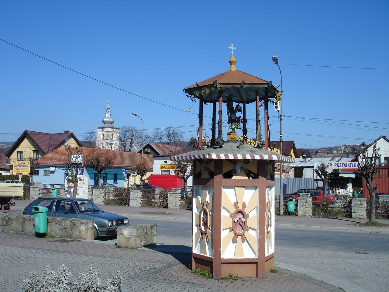 main square in Łącko